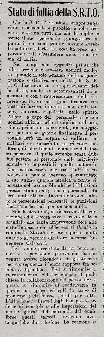 articolo tratto dal periodico "Il tramviere italiano"